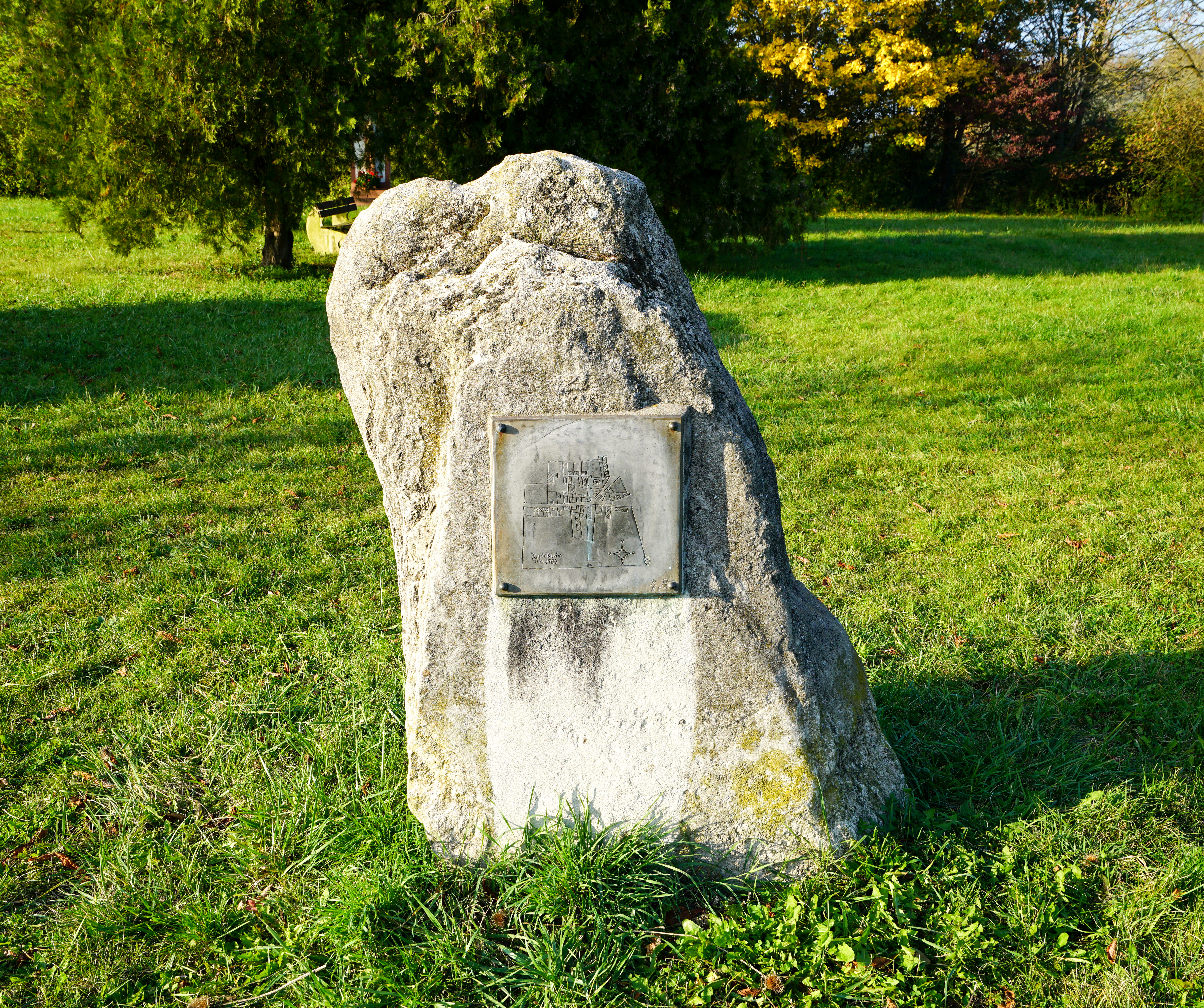 Gedenkstein an Rudelsheim mit einem Lageplan von Rudelsheim, das Rudelsheim um das Jahr 1784 zeigt, auf der ehemaligen Gemarkung der Gemeinde Rudelsheim auf der heutigen (2017) Gemarkung der Ortsgemeinde Ludwigshöhe in Rheinhessen. Am 25. August 1822 erfolgte die Grundsteinlegung von Ludwigshöhe, deren Ortsmitte heute (2017) etwa zwei Kilometer westlich dieses Gedenksteins liegt.